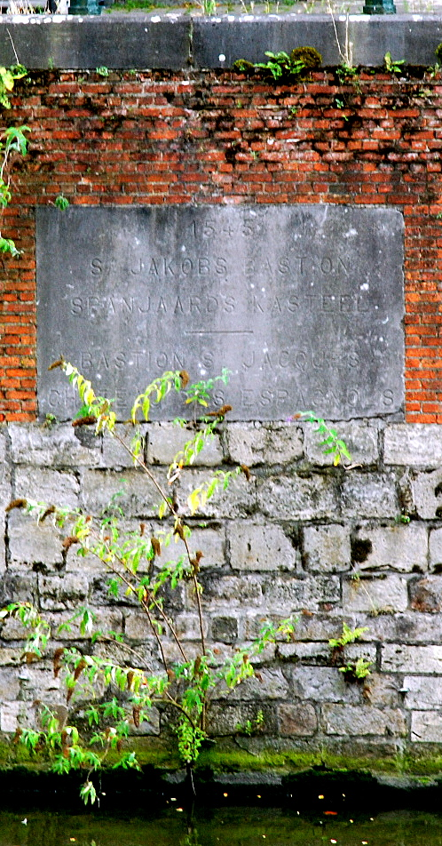 Detail van de gedenkplaat in de kademuur aan de Schoolkaai in Gent (België) die het restant van het Sint-Jacobsbastion van het Spanjaardenkasteel aangeeft.